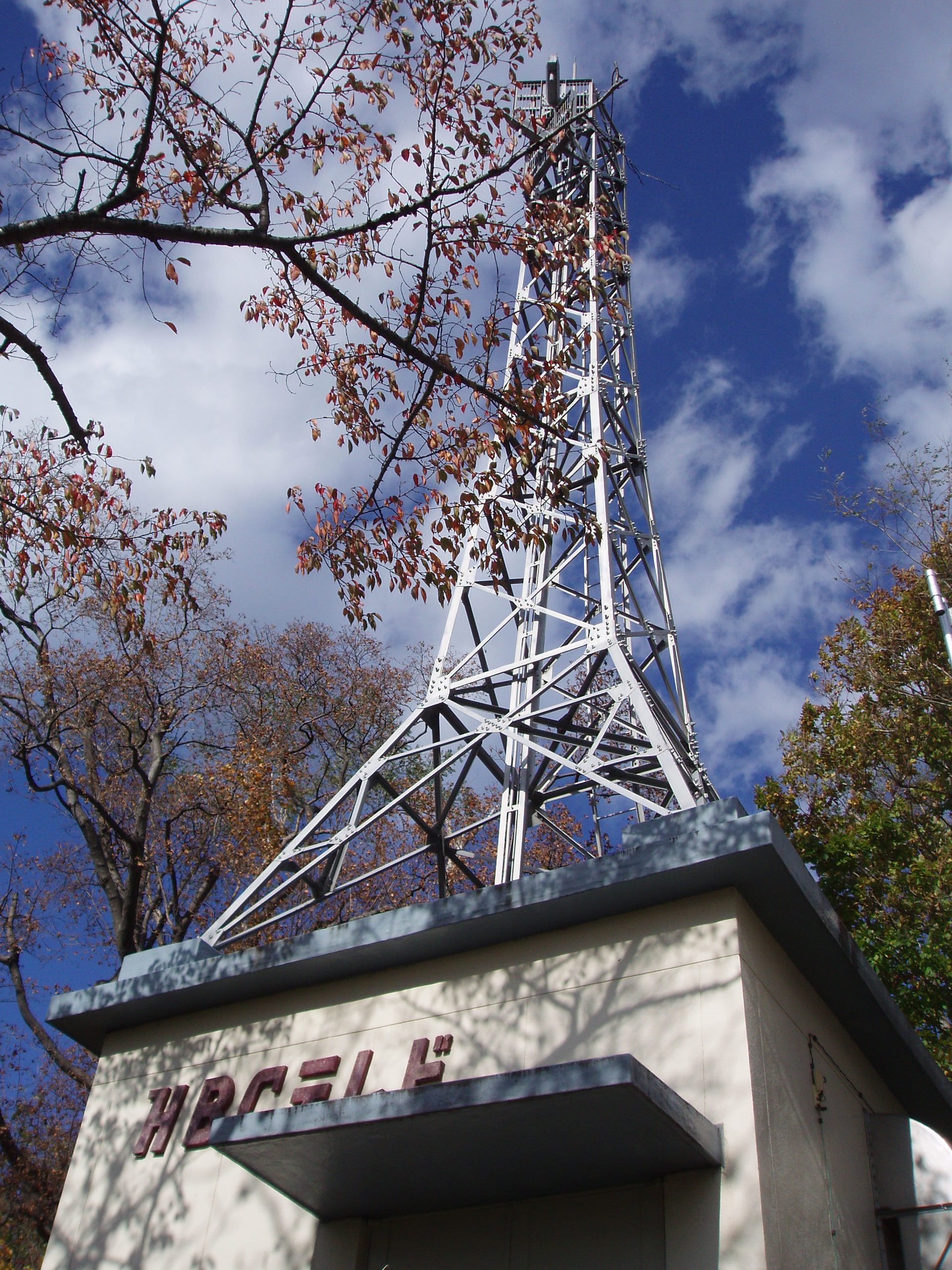 小樽中継局 HBC送信設備